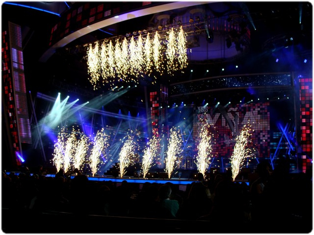 Apertura de la última noche del Festival de Viña 2010.